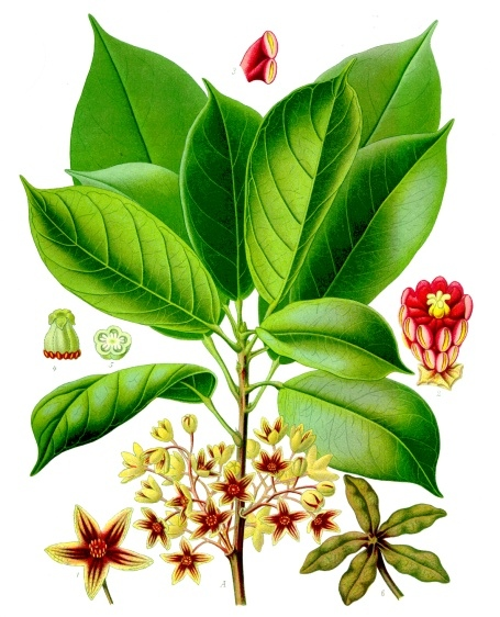 Kolabaum. A Blütenzweig 2/3 natürlicher Grösse. 1 männliche Blüte 2/1; 2 Staubblattsäule 2/1; 3 ein Staubblatt von der Seite; 4 Pistill; 5 Querschnitt desselben; 6 unreife Frucht verkleinert.